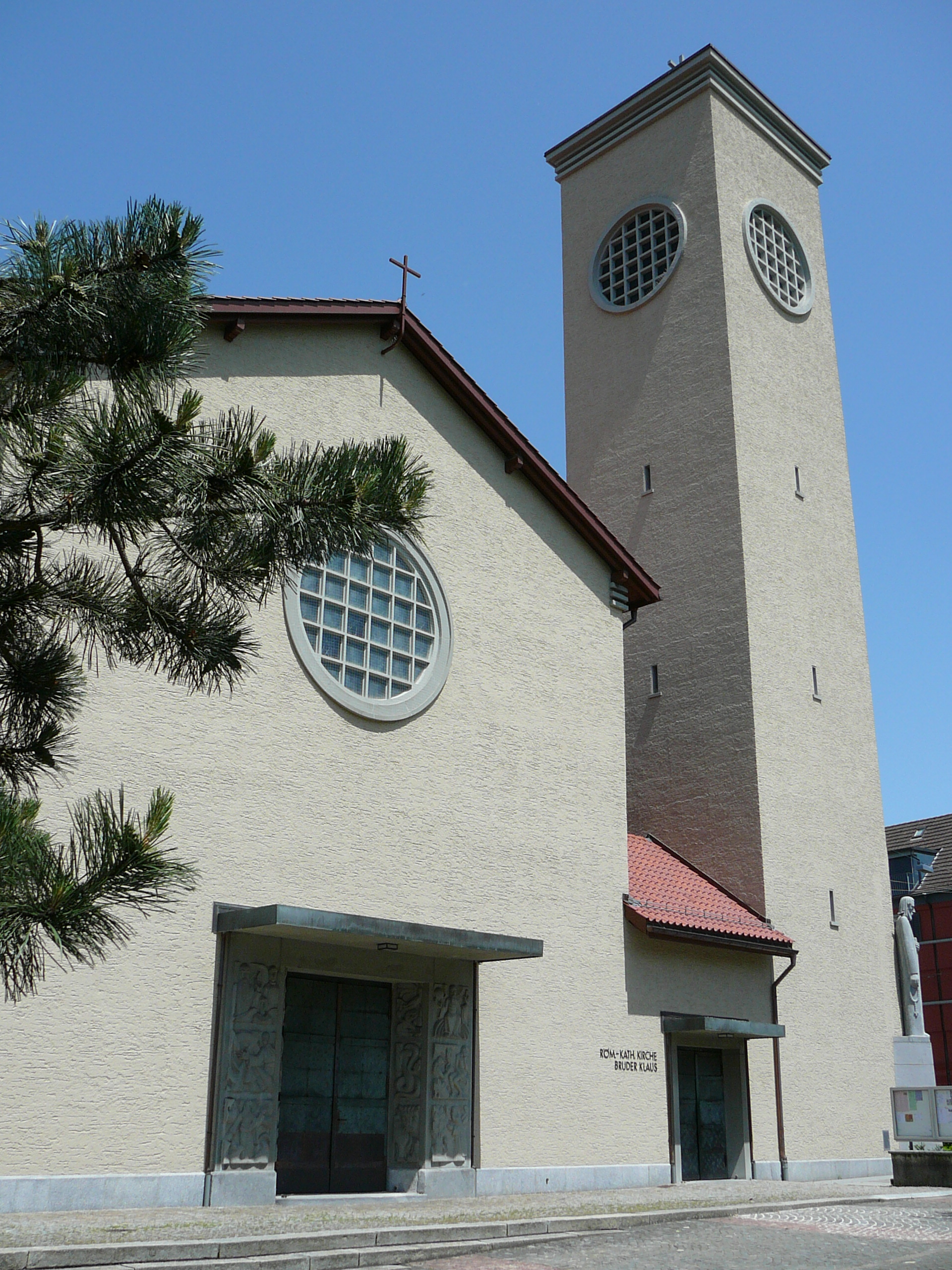 Römisch-katholische Kirche Bruder Klaus (Zürich-Unterstrass) Blick von der Milchbuckstrasse her